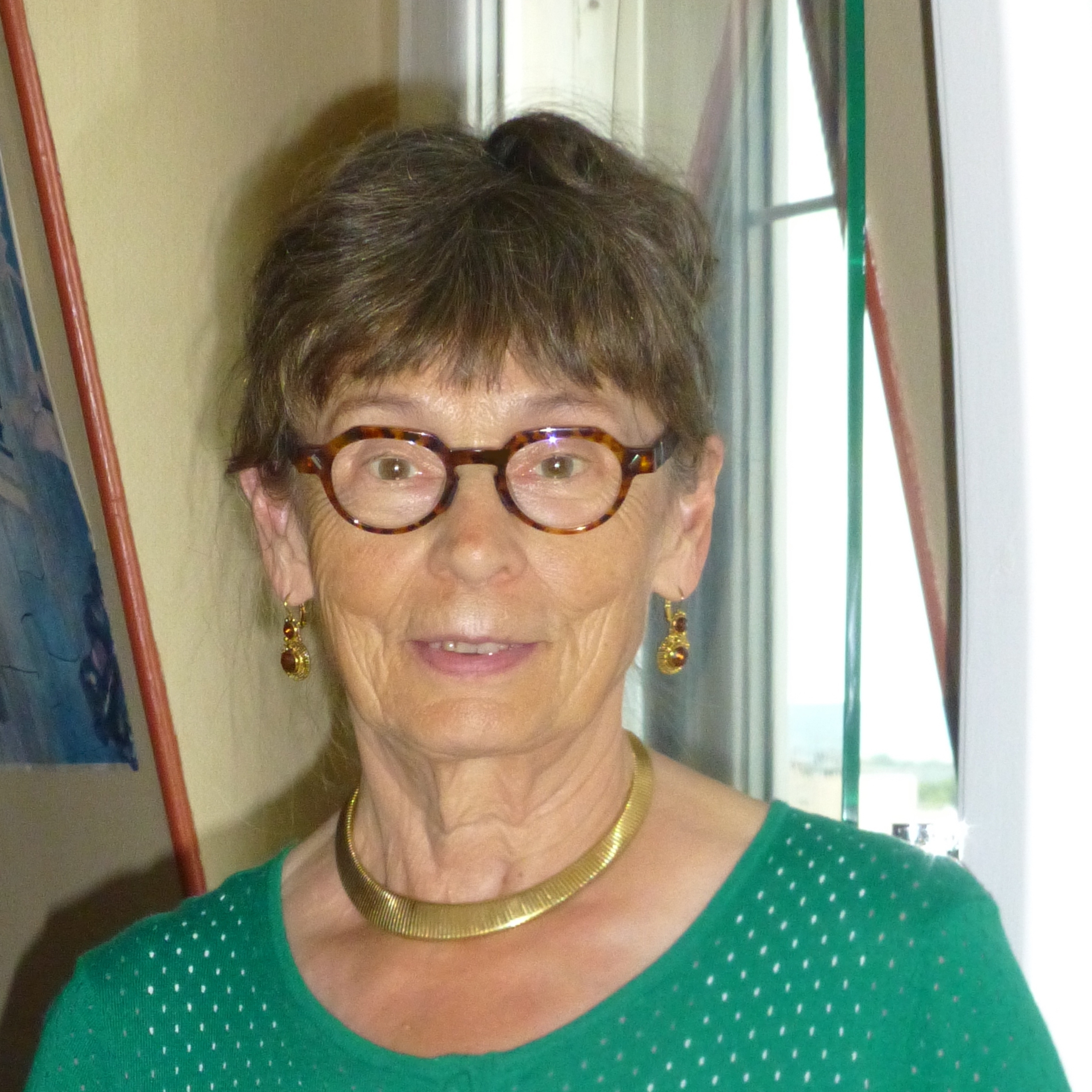 Entre deux pages...